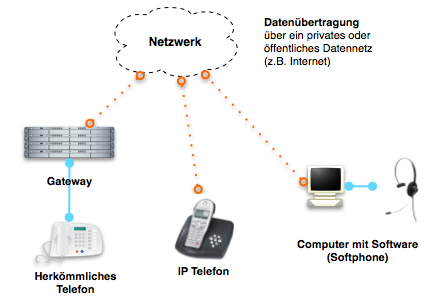 Eingeräte bei VoIP